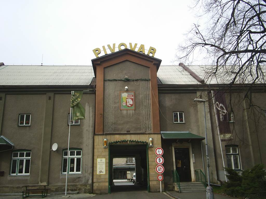 Průčelí pivovaru Pardubice